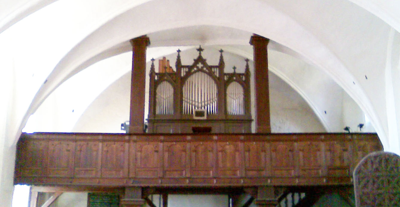 Kirche Schaprode, Orgel